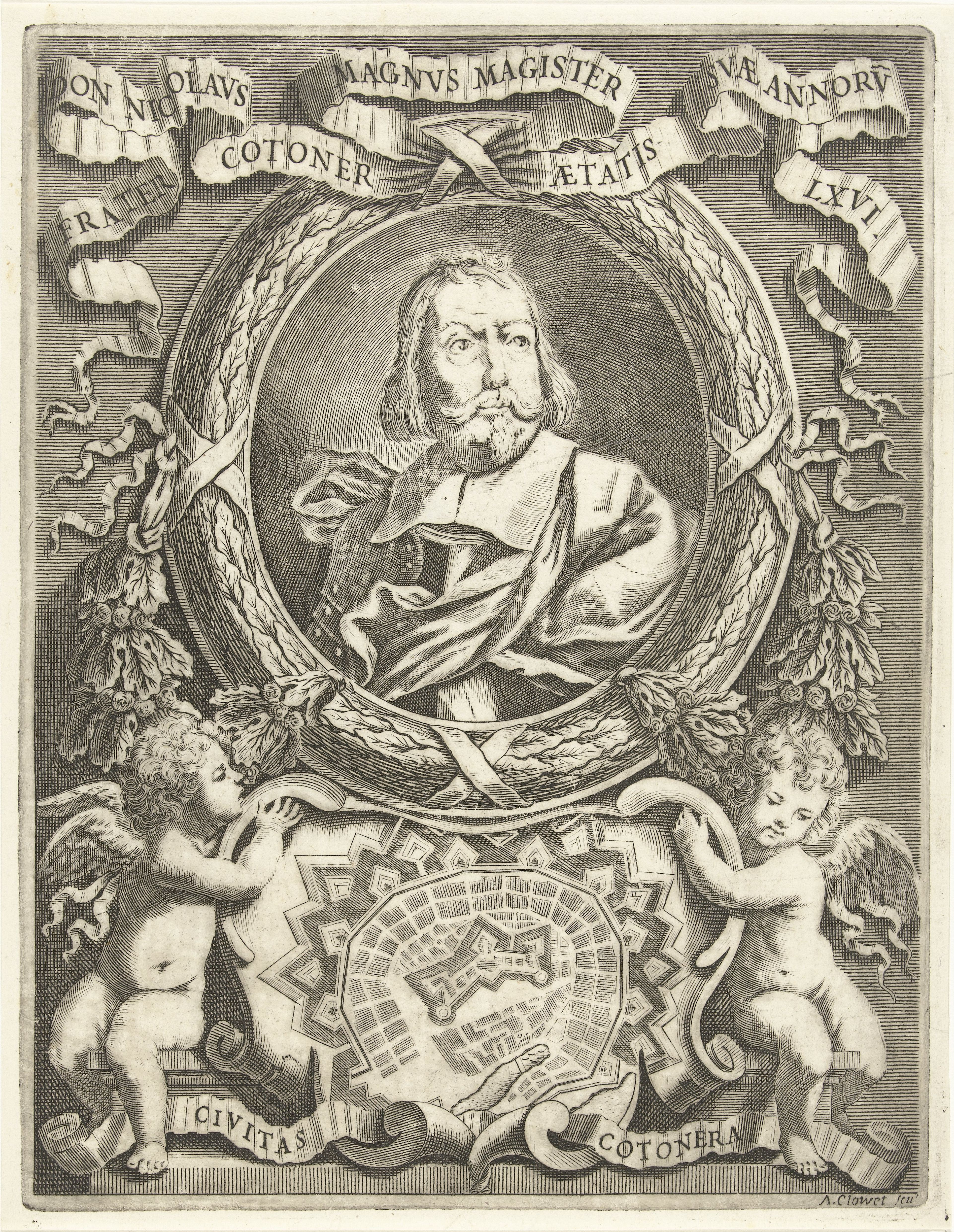 IdentificatieTitel(s): Portret van Nicolás CotonerObjecttype: prent Objectnummer: RP-P-1910-4286Opschriften / Merken: verzamelaarsmerk, verso midden onder, gestempeld: Lugt 2228Omschrijving: Portret in ovale lijst van Nicolás Cotoner, grootmeester van de Malteser Orde. Buste naar rechts. Onderaan de prent houden twee engelen een cartouche omhoog met het plattegrond van de Sacra Infermeria in Valletta.VervaardigingVervaardiger: prentmaker: Albertus Clouwet (vermeld op object)naar eigen ontwerp van: Albertus ClouwetPlaats vervaardiging: RomeDatering: 1666 - 1679Fysieke kenmerken: gravureMateriaal: papier Techniek: graveren (drukprocedé)Afmetingen: plaatrand: h 220 mm × b 169 mmOnderwerpWaar: VallettaWie: Nicolás CotonerVerwerving en rechtenVerwerving: aankoop 1905Copyright: Publiek domein